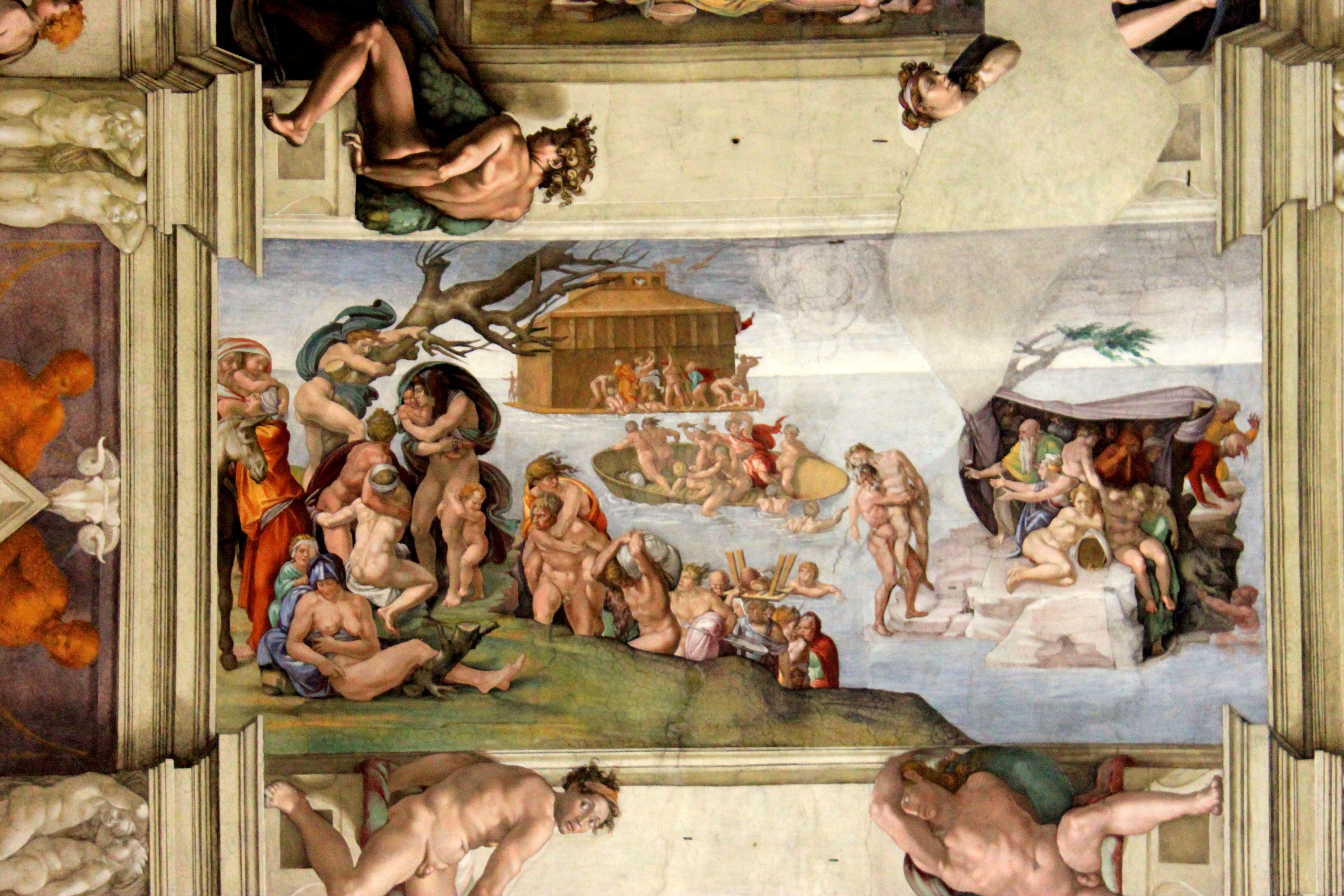 El Diluvio